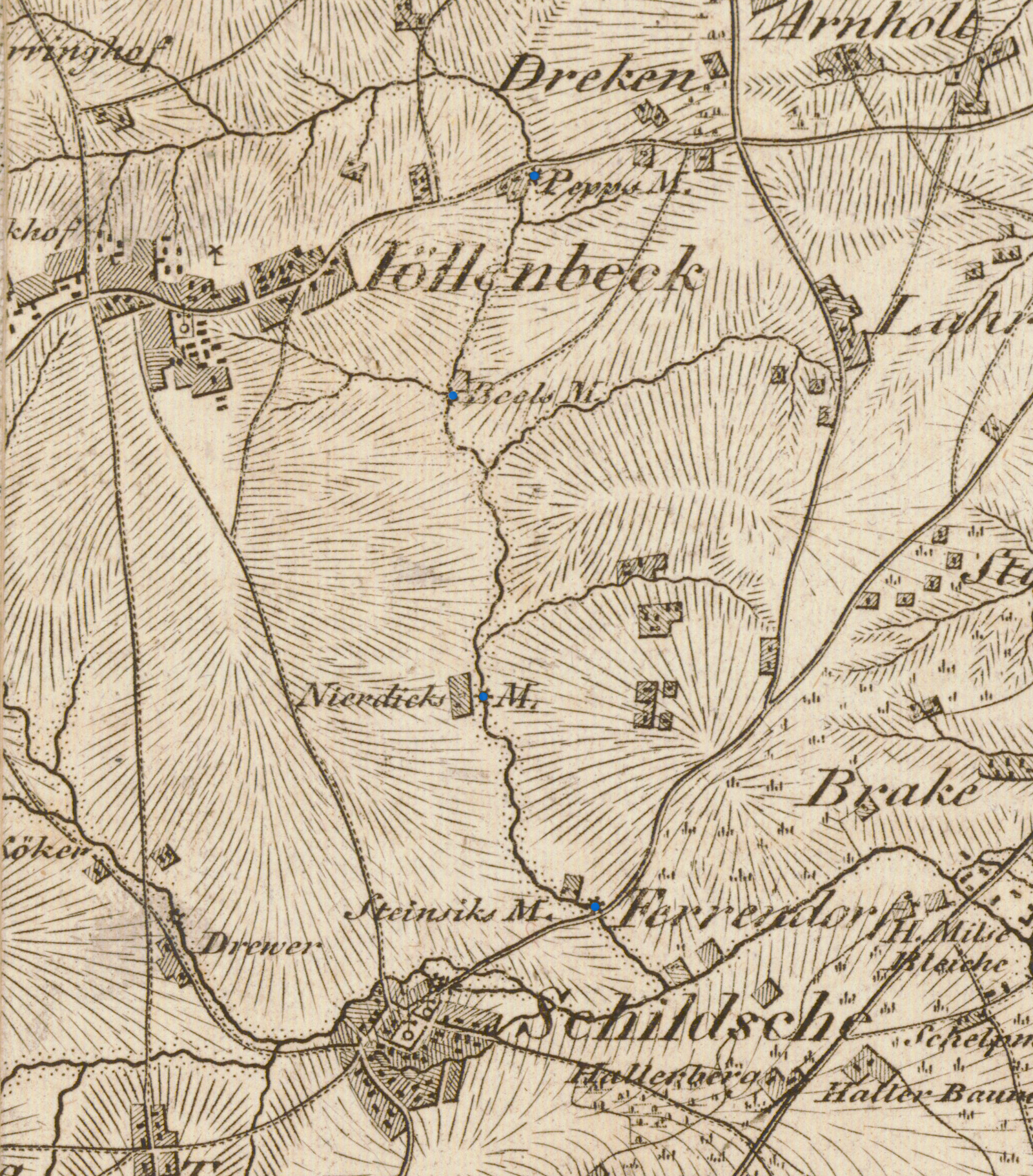 Historische Landkarte von Bielefeld von 1805 (Jöllenbeck, Theesen, Vilsendorf, Schildesche) mit den Standorten der Wassermühlen am Jöllenbecker Mühlenbach